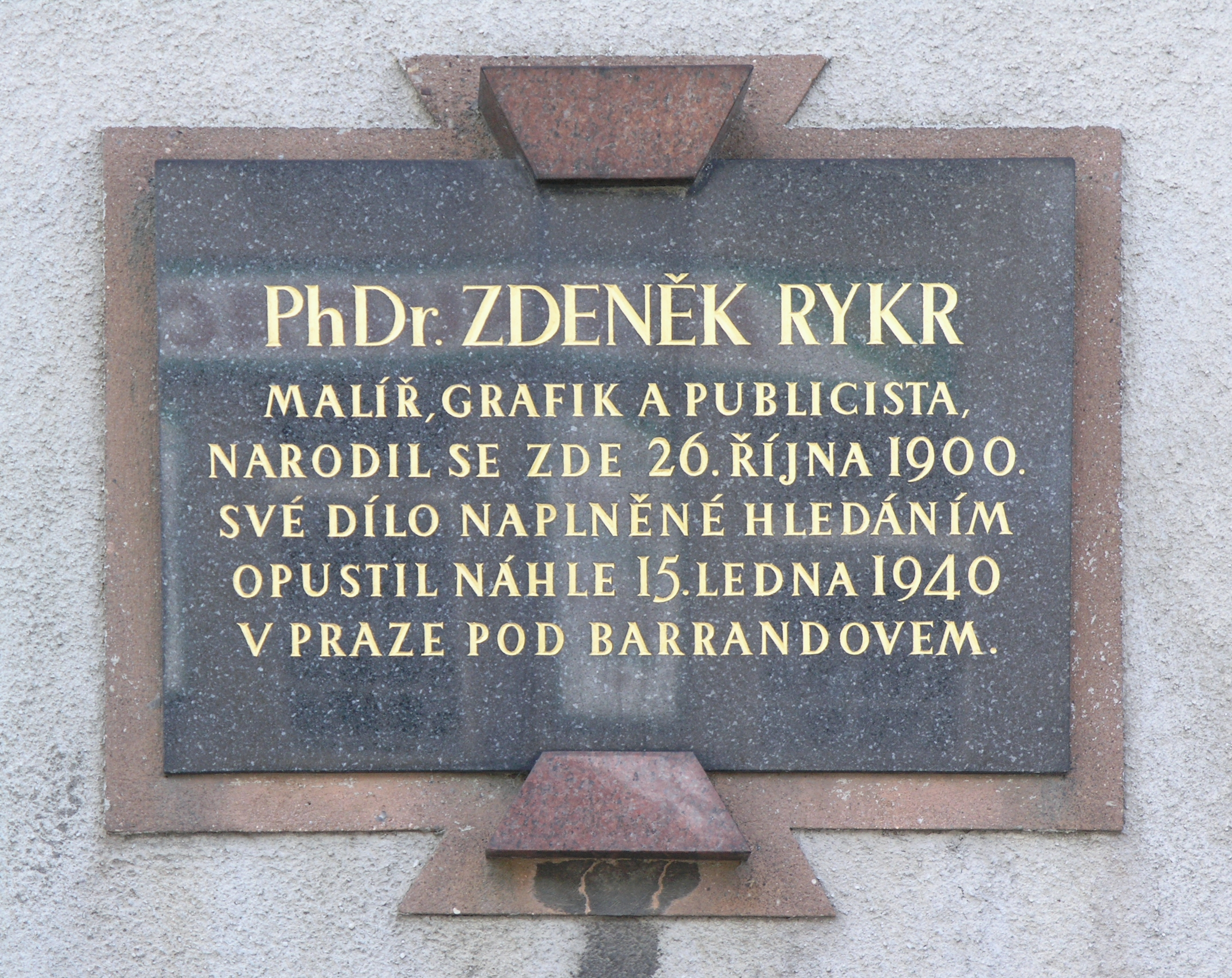 Chotěboř - pamětní deska PhDr. Zdeňka Rykra na budově vlakového nádraží